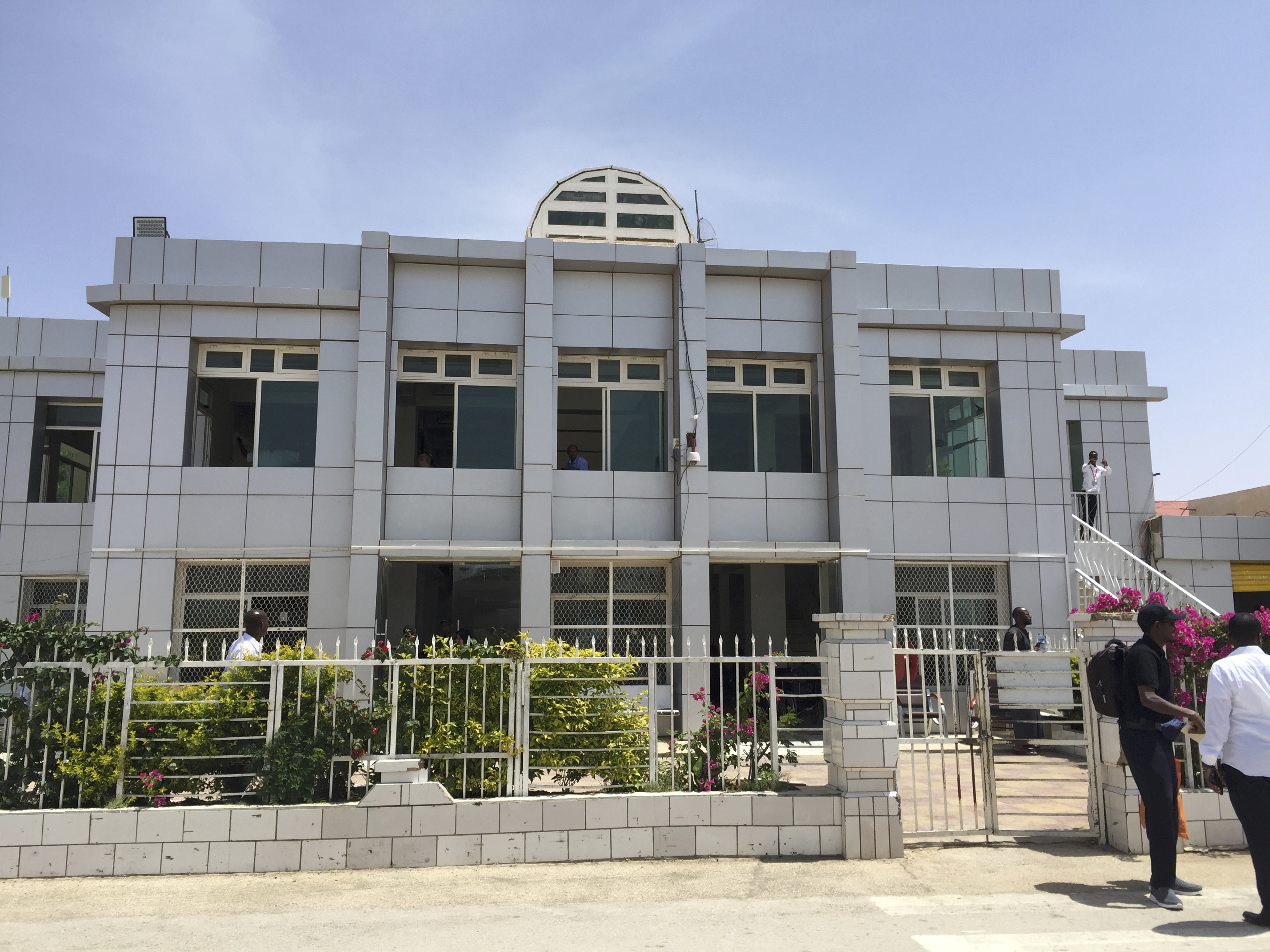 Somaliland and Hargeisa